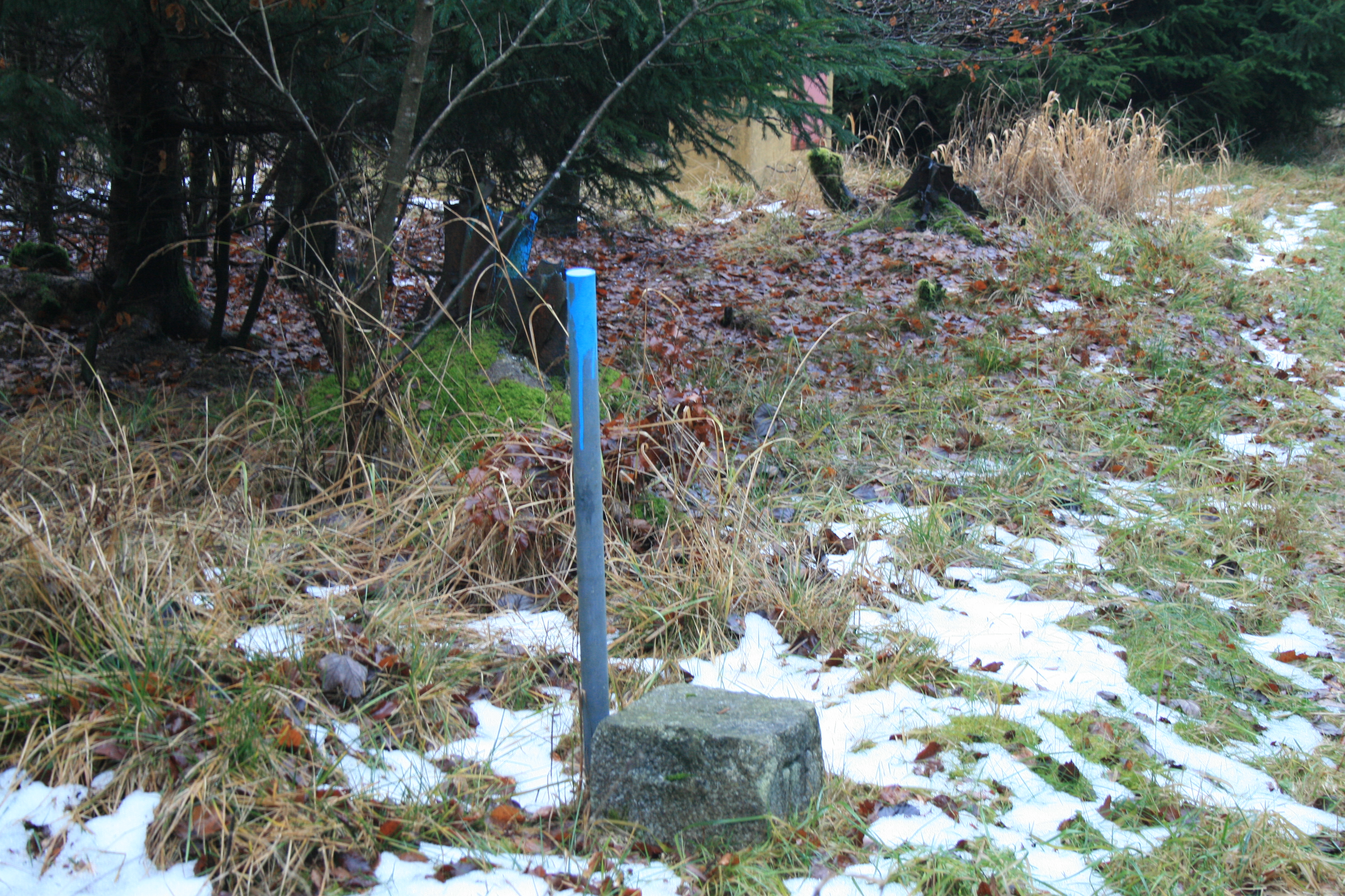 Trigonometrischer Punkt (TP) an der höchsten Stelle vom Stegskopf